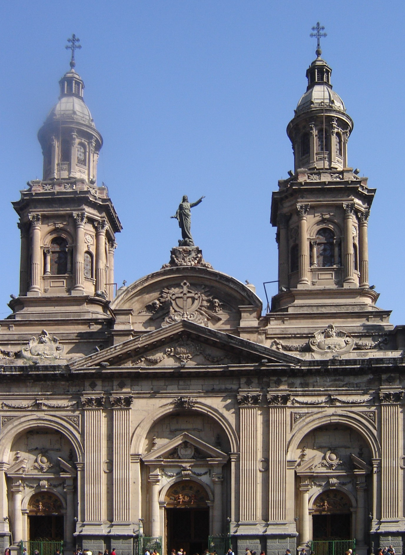 Catedral Metropolitana de Santiago La fotografia es trabajo propio del autor del articulo